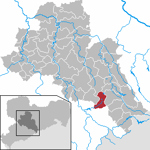 Großhartmannsdorf in Saxony - district Mittelsachsen